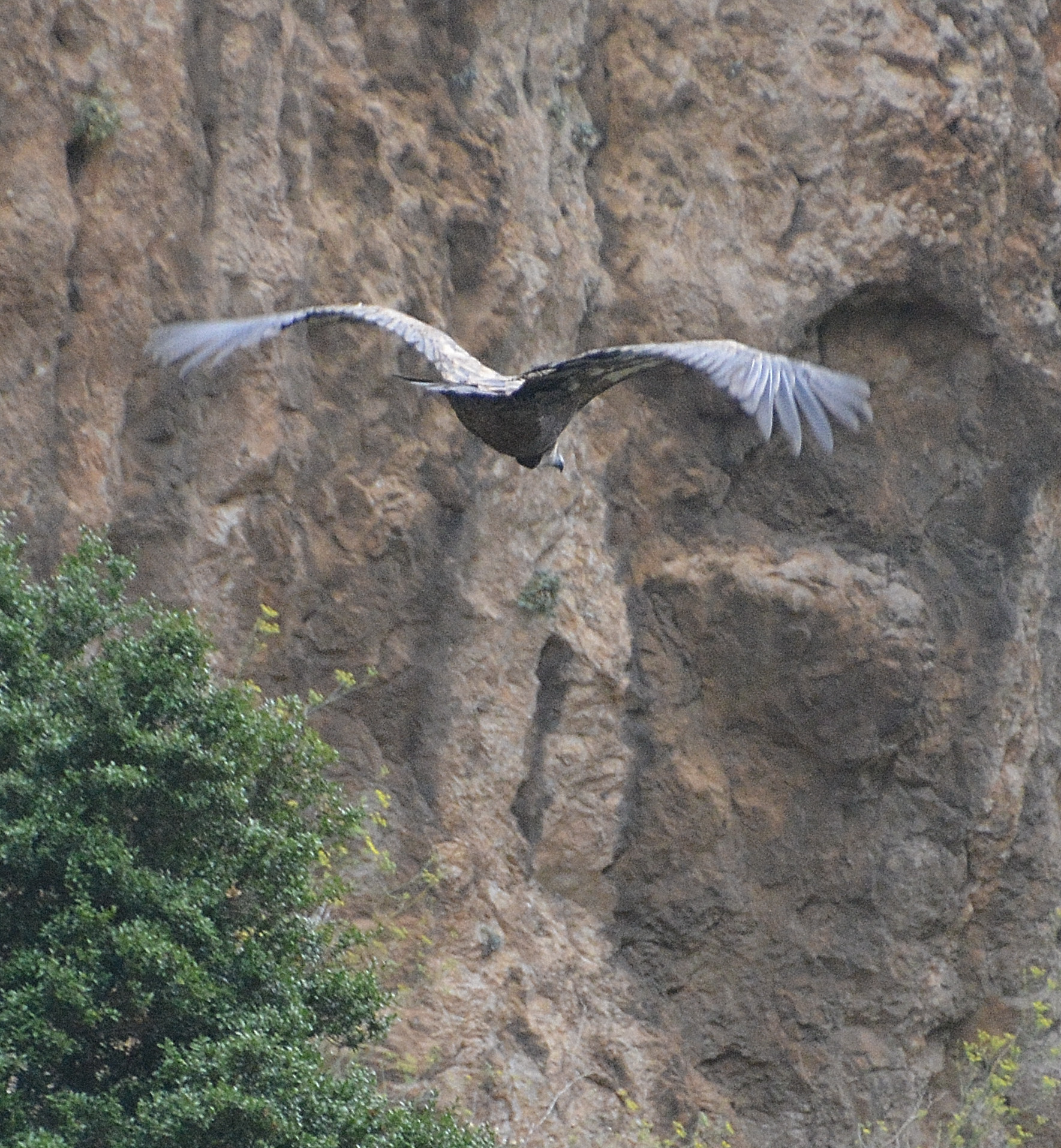 Sistema fluvial de los ríos Irati, Urrobi y Erro This is a photography of a Site of Community Importance in Spain with the ID: ES2200025. Natura2000 entry, EEA entry